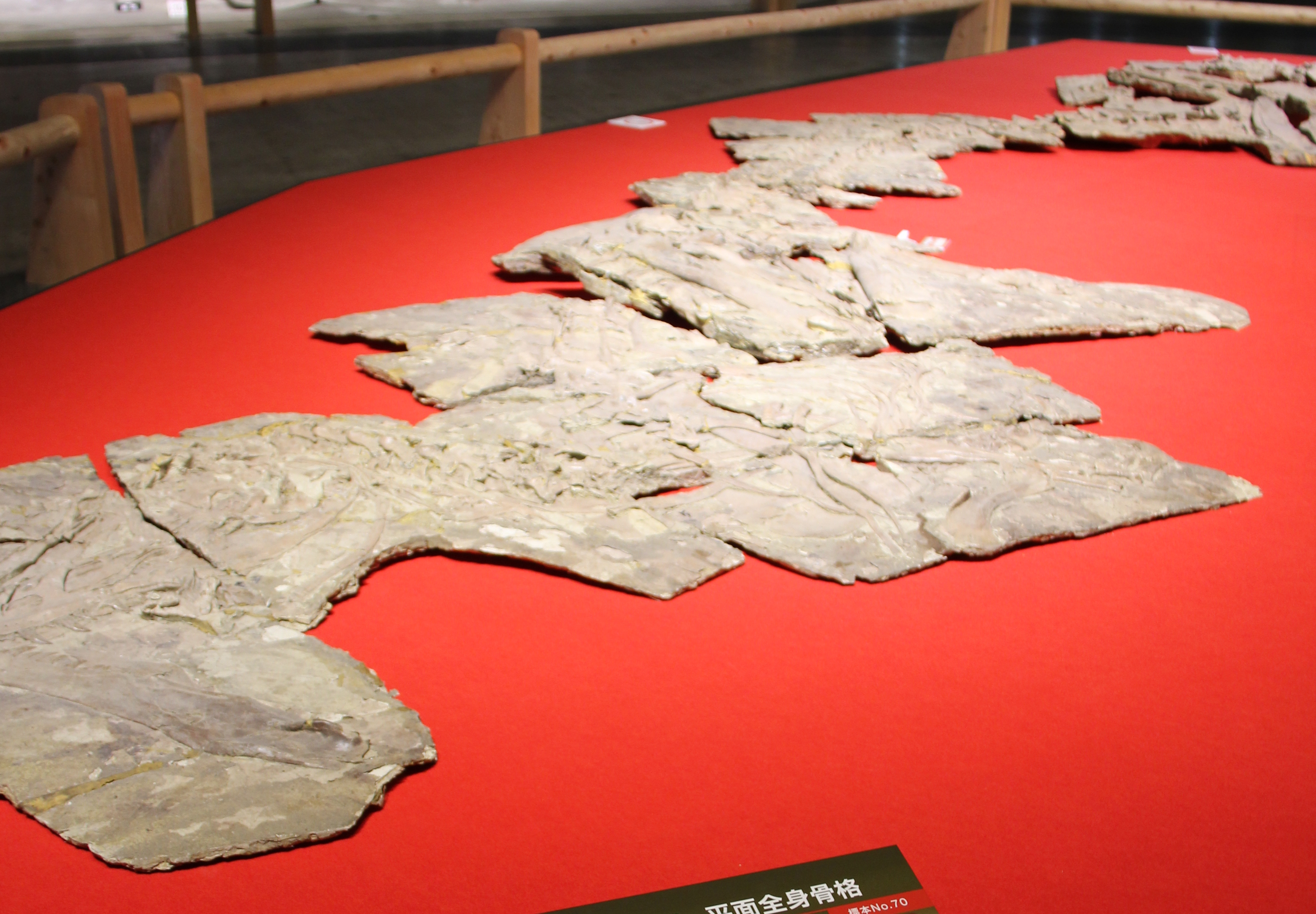 Dino Kingdom 2012